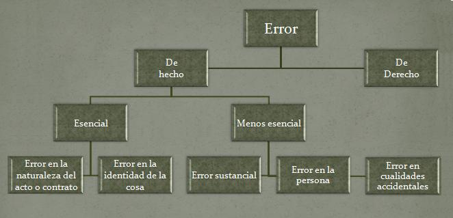 Mapa del error como vicio de la voluntad